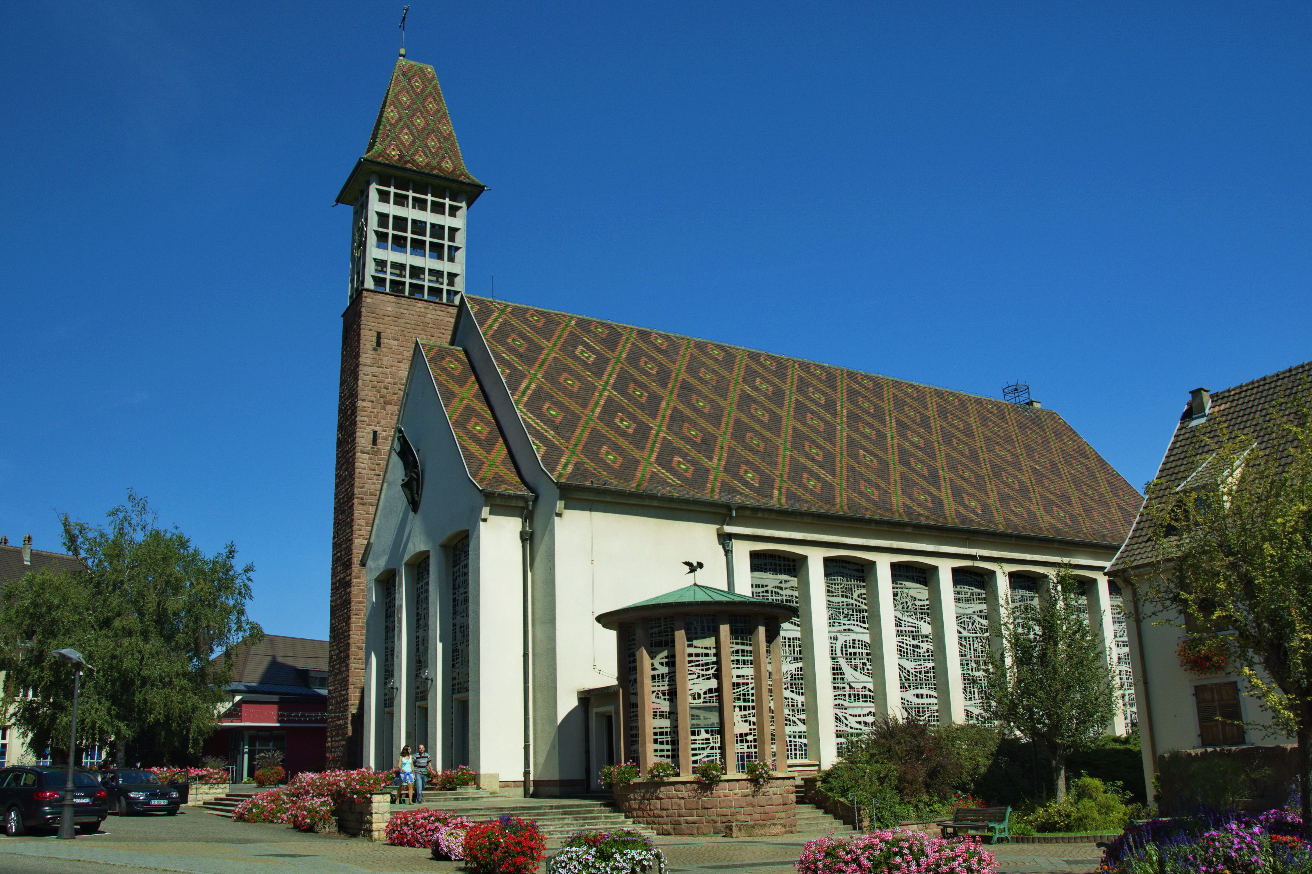 Église Saints-Pierre-et-Paul de Bennwihr, (Inscrit, 1931) .